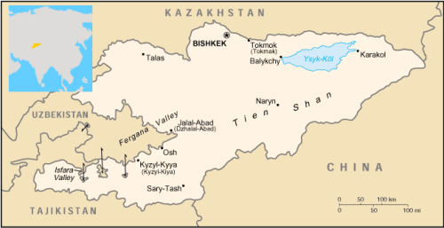 Kyrgyzstan map